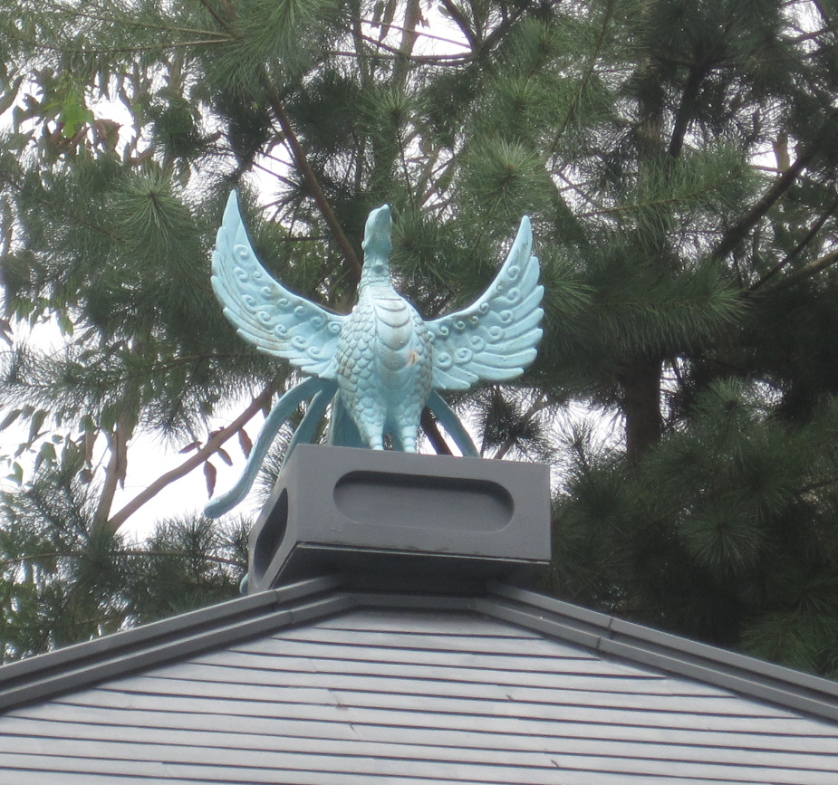 三義建中國小奉安殿屋頂鳳凰裝飾